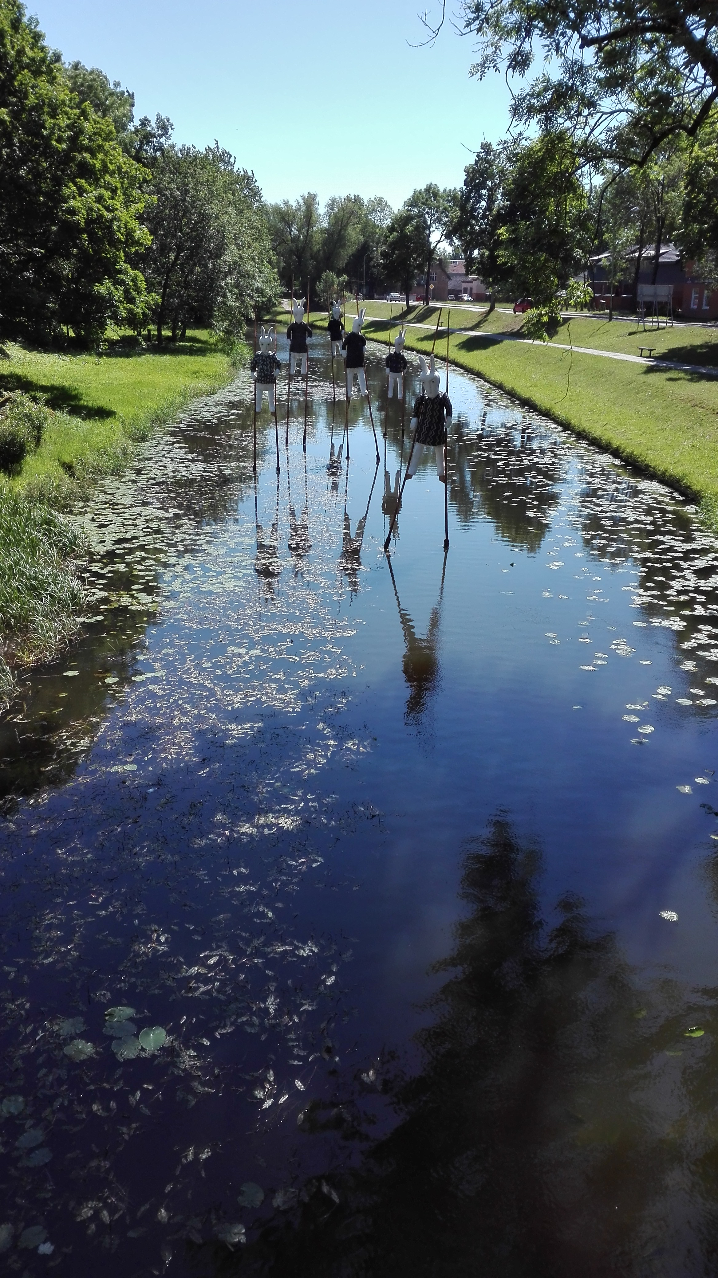 Šyša Šilutės centre